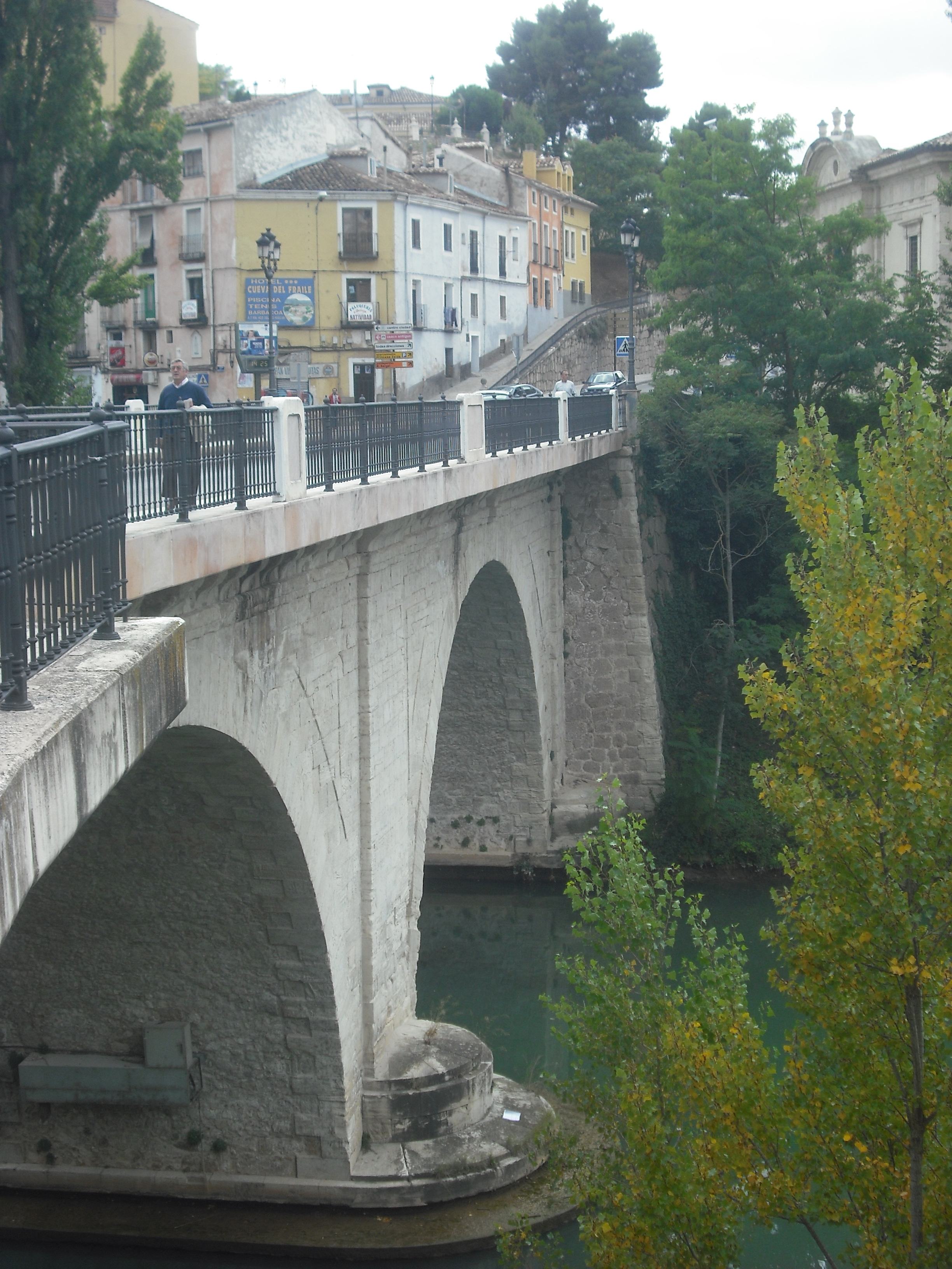 Puente de San Antón.